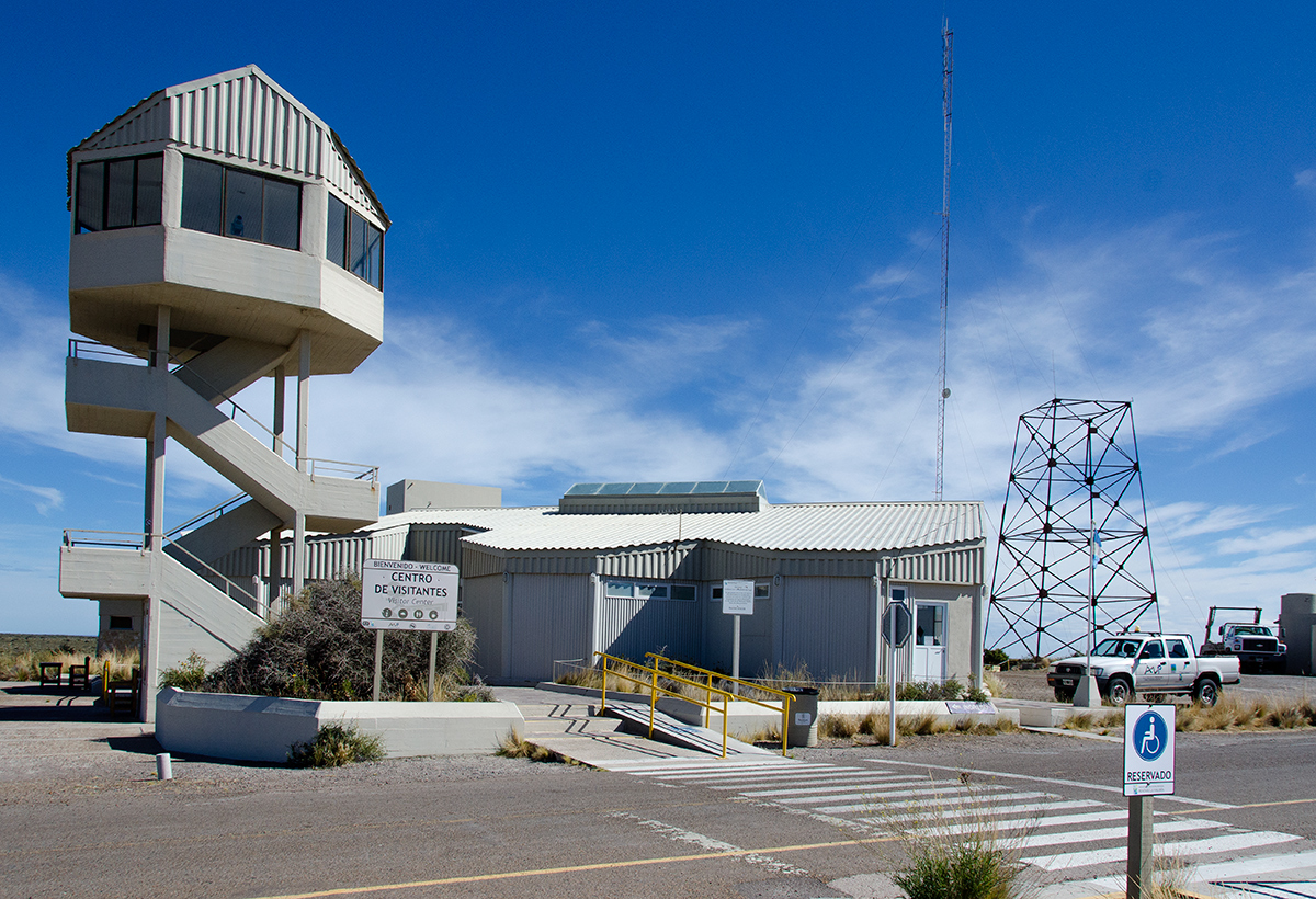 Centro de Visitantes "Istmo Carlos Ameghino", la edificación se encuentra en el istmo que separa la Península de Valdez del resto del continente.